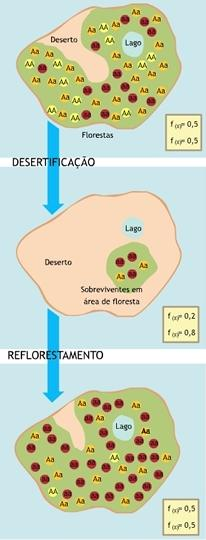 Reduções drásticas no tamanho populacional podem alterar significativamente suas frequências gênicas. Os sobreviventes de uma alteração climática, por exemplo, podem não representar a composição genética da população primitiva, reconstituindo novas populações às vezes muito diferentes da original.